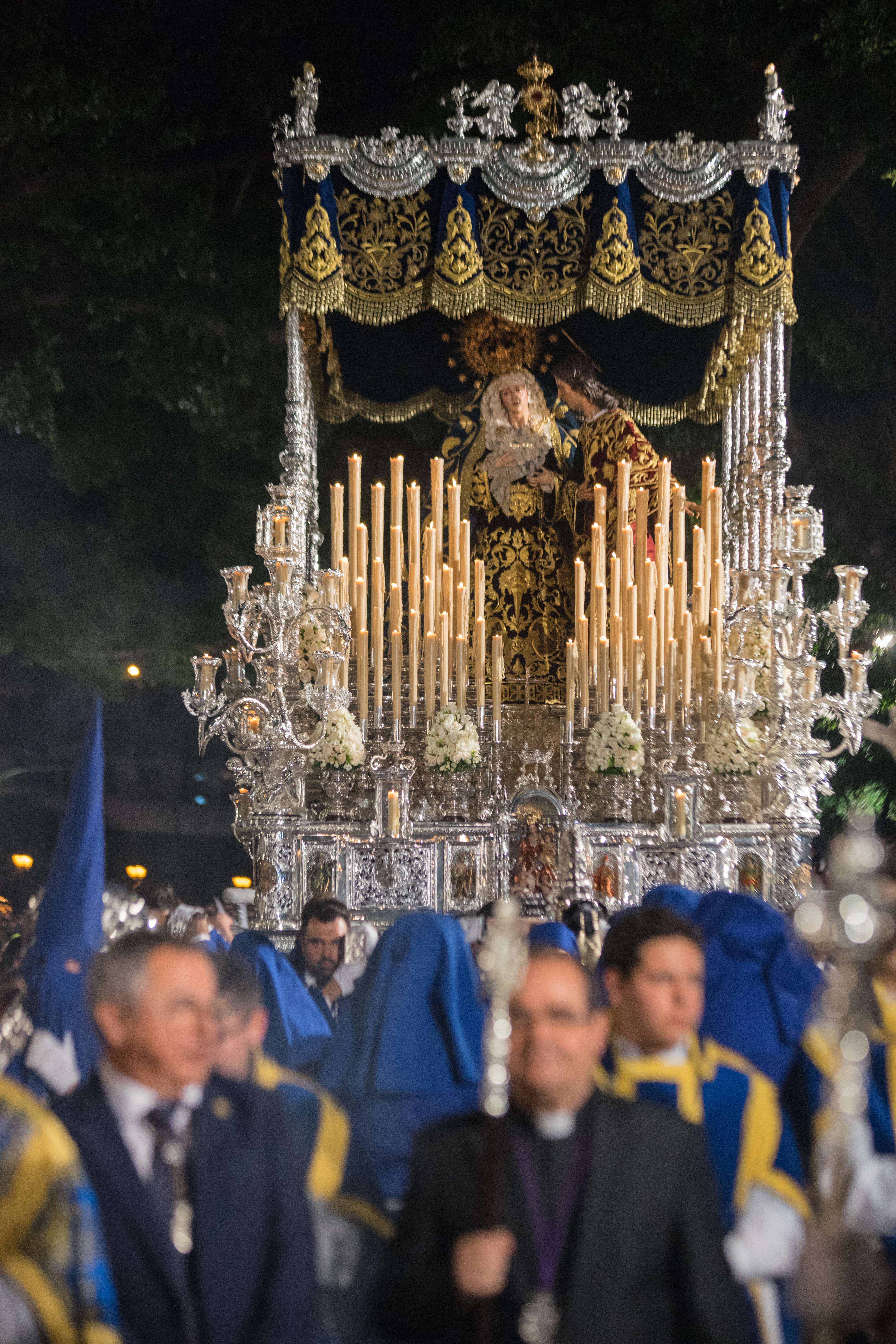 Primitiva Hermandad Sacramental y Reales Cofradías Fusionadas de Ntro. Padre Jesús de Azotes y Columna, Stmo. Cristo de la Exaltación, Stmo. Cristo de Ánimas de Ciegos, María Santísima de Lágrimas y Favores, e Ilustre Archicofradía de la Santa Vera+Cruz y Sangre, Ntra. Sra. del Mayor Dolor y San Juan Evangelista This is a photography of a Folklore festival in Spain (Wikidata id Q9075883).